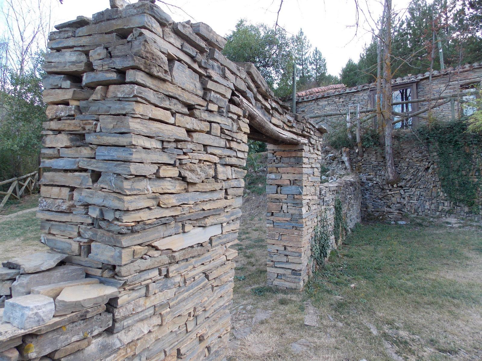 Detalle de una calle y construcción típica con piedra seca del despoblado rehabilitado de Valdelavilla, Soria (España)